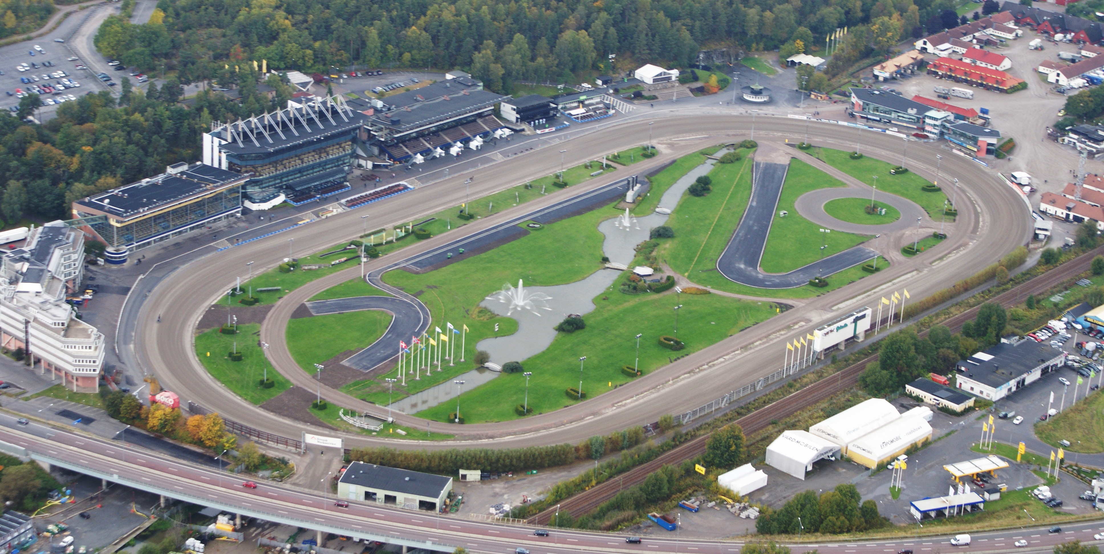 Іподром Сулвалла у районі Белльста комуни Стокгольм. Через центр іподрому протікає річка Белльстаон.